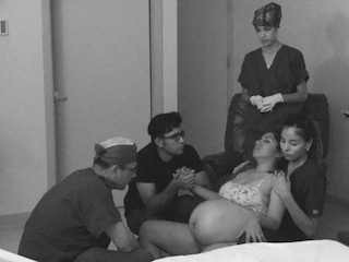 El profesional que atiende a una mujer con libertad de movimiento debe adaptarse a los movimientos espontáneos de la mujer que busca el alivio del dolor y a la vez permitir el descenso fetal dentro de su pelvis. Es común que busque posiciones en cuclillas, sentada u otras con rodillas flexionadas lo cual abre mas la salida o estrecho inferior de la pelvis.